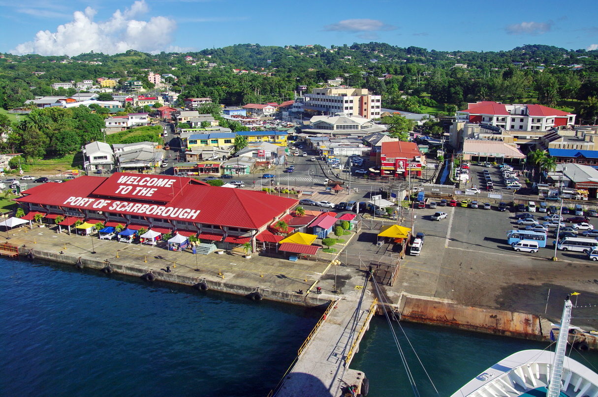 Passagierterminal Scarborough, Tobago